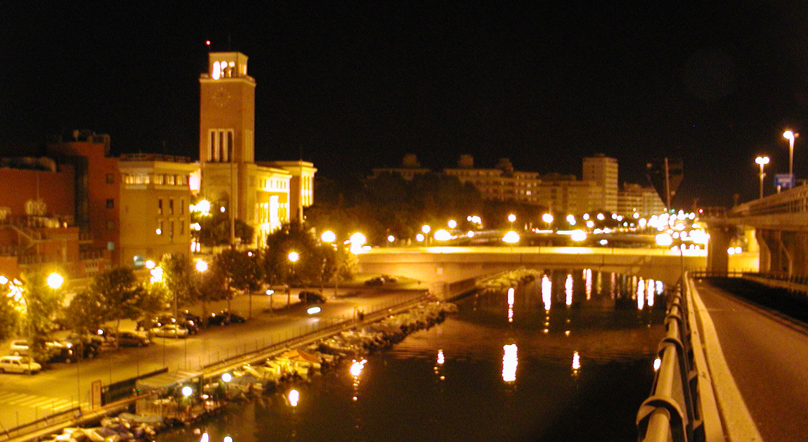 Der alte Jachthafen bei Nacht